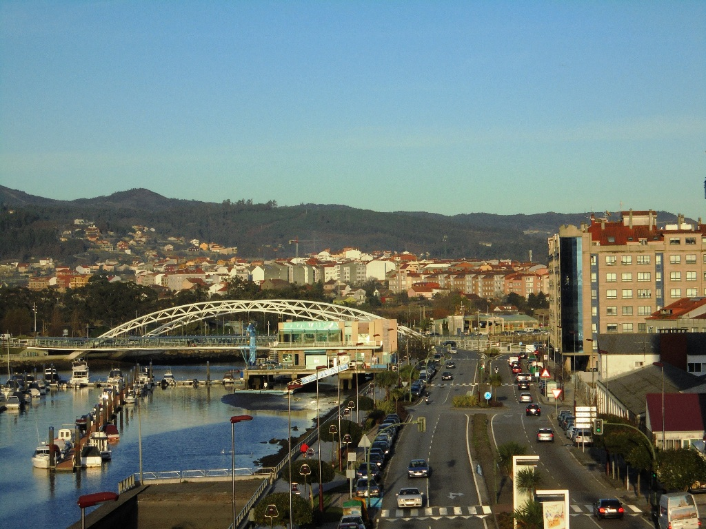 Avenida de Orillamar y puente de las Corrientes Pontevedra capital